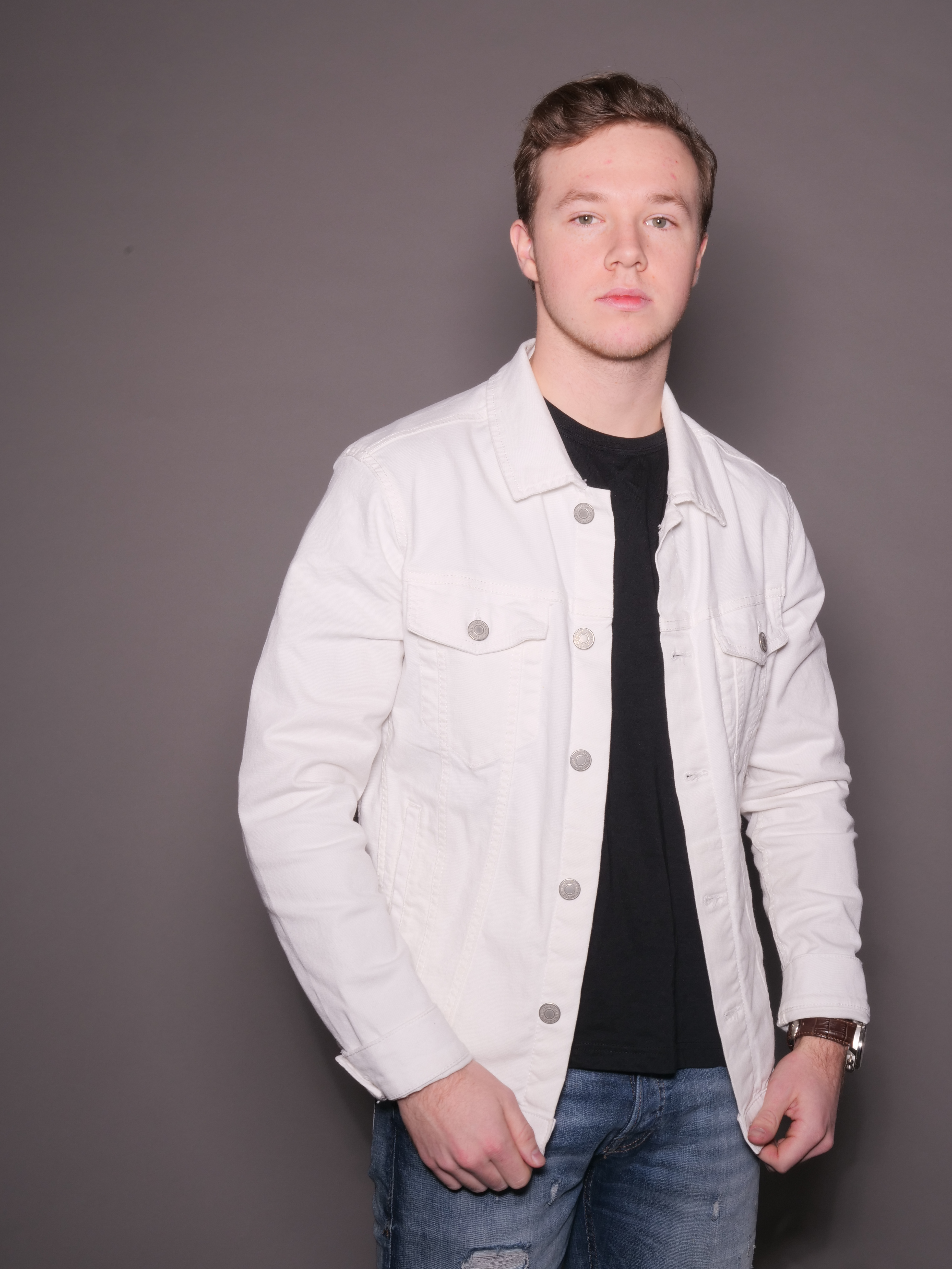 Ida Johansson och Elina Danielsson i Isle of You